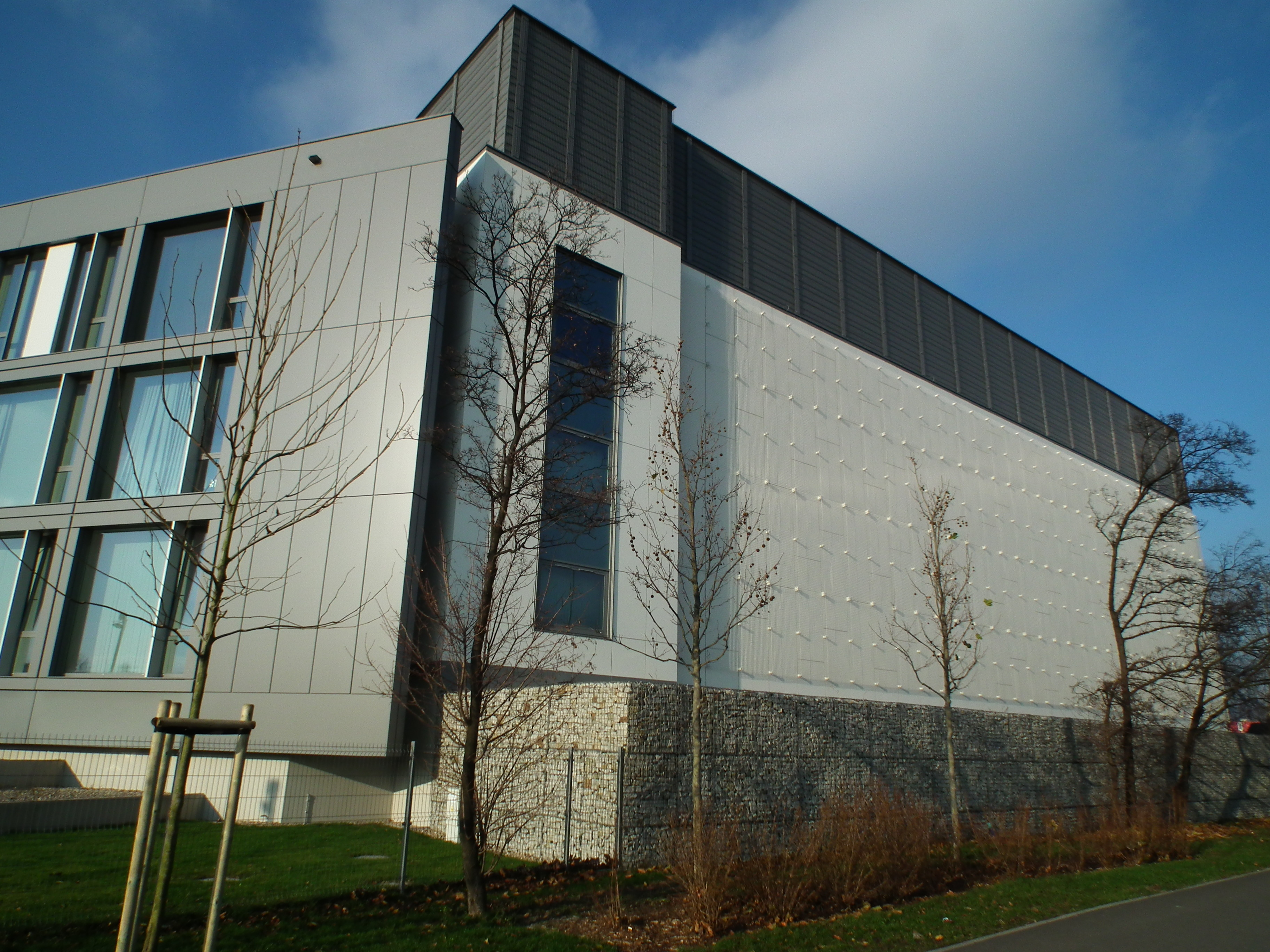 Centrum Badawcze Polskiego Internetu Optycznego (Poznań), ul. Jana Pawła II.